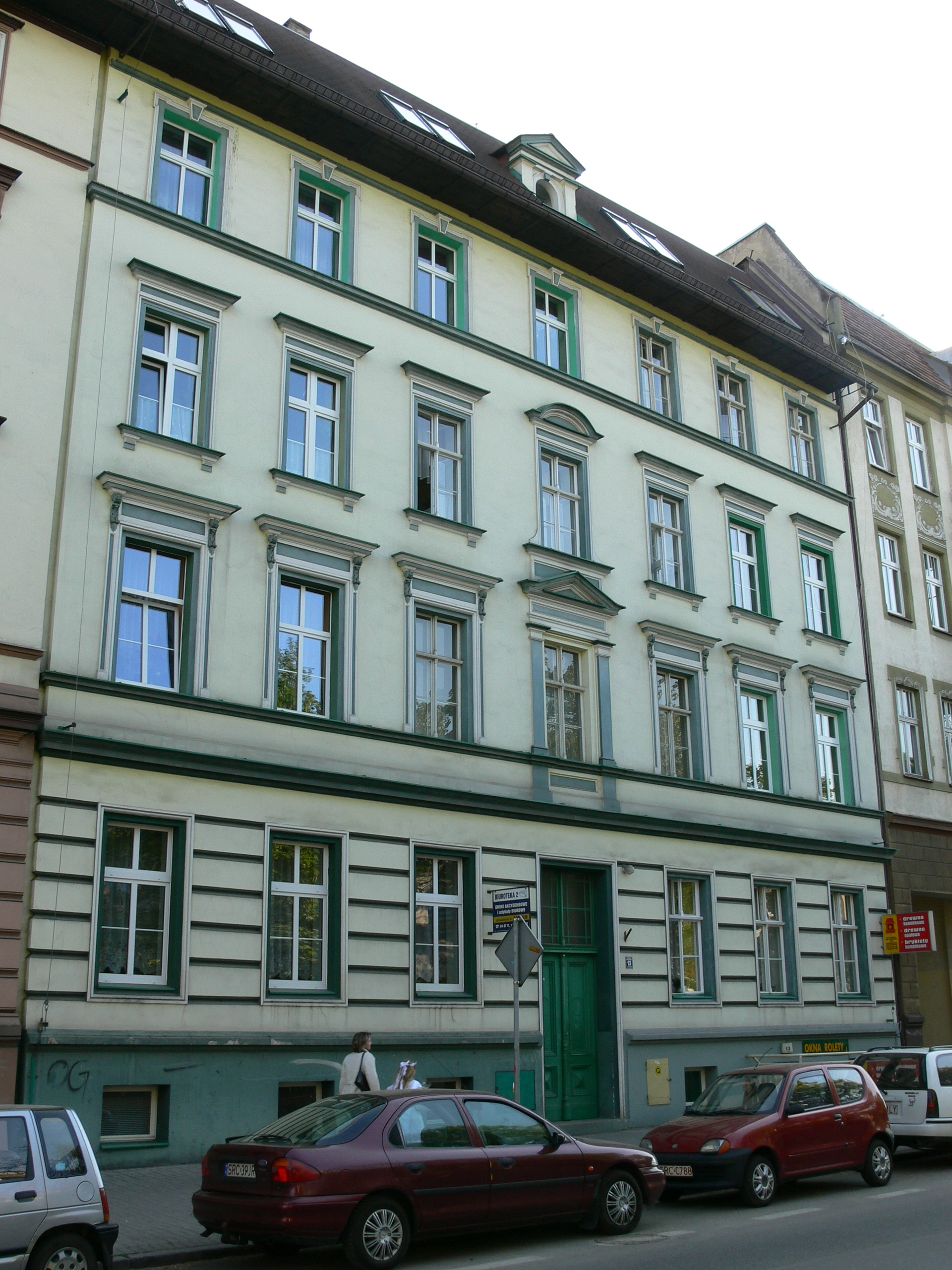 Racibórz - kamienica przy ul. Staszica 13